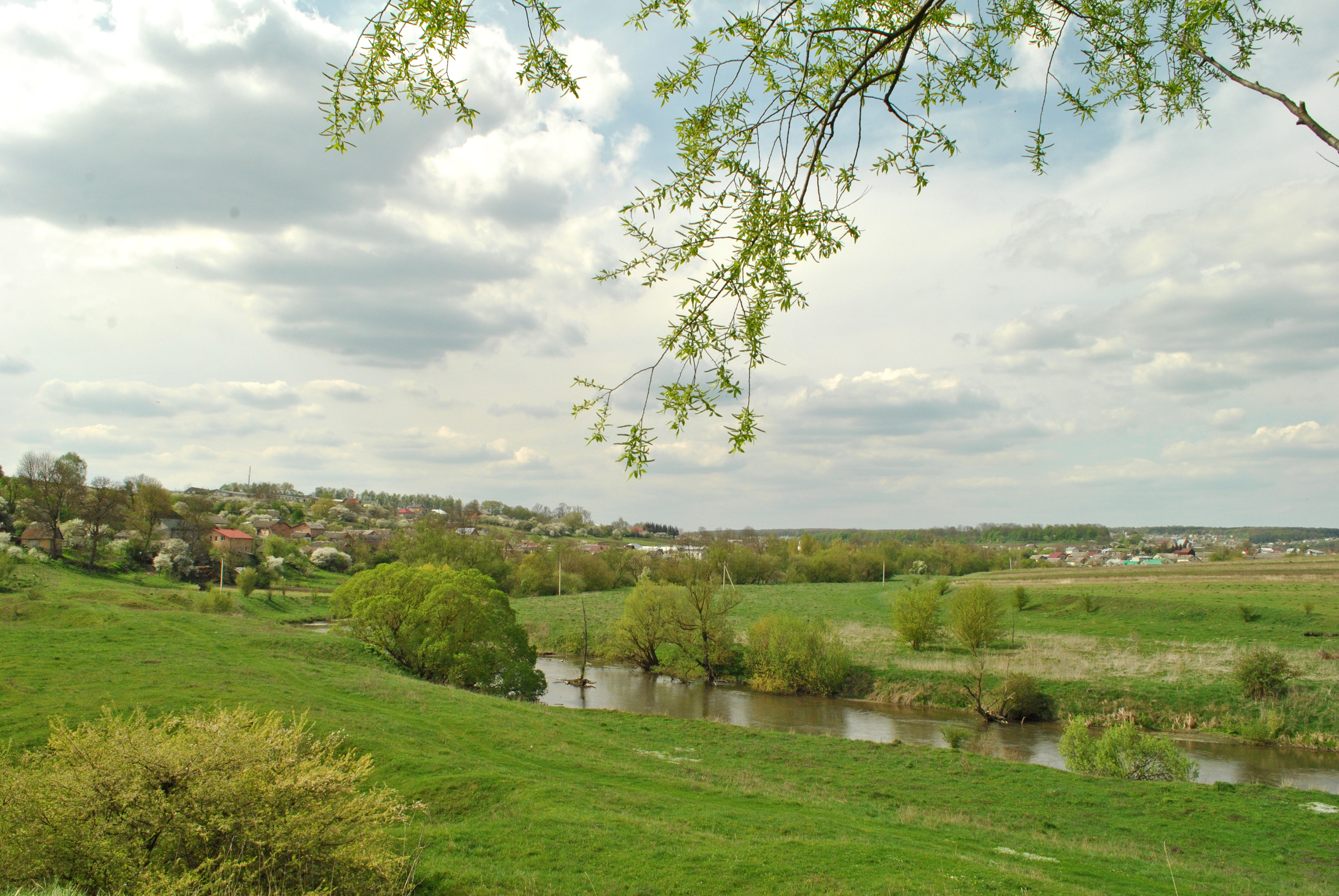 Вигляд на село Буцнів Тернопільського району Тернопільської області з південного сходу. Внизу протікає річка Серет.